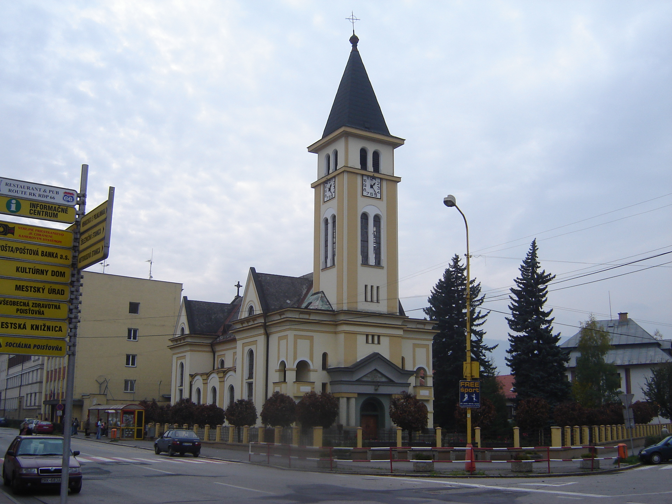 Evanjelický kostol v Ružomberku